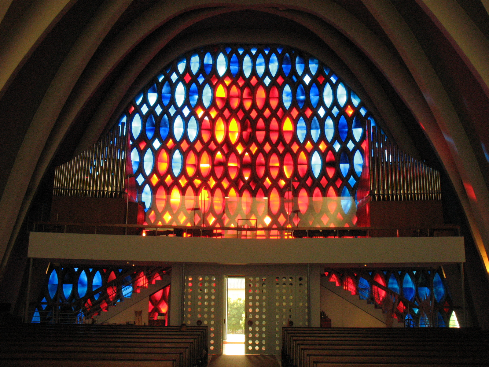 Evang. Heilig-Geist-Kirche Innenansicht